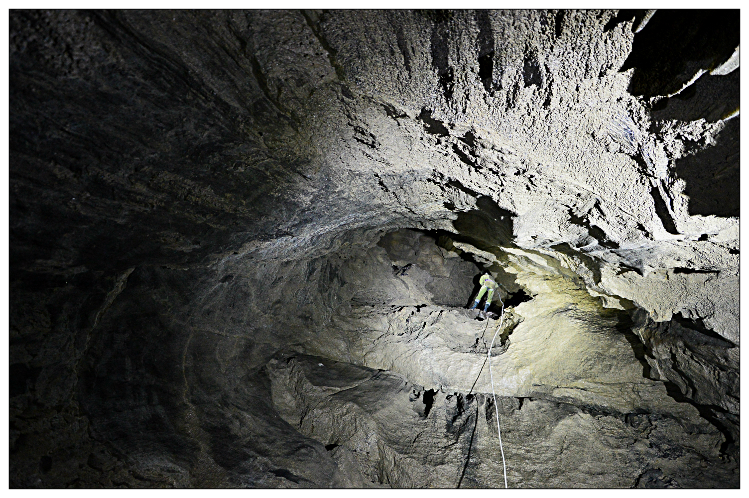 Visuale dal basso di un pozzo nell'Abisso Peroni